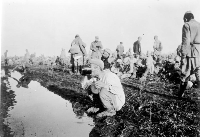 Russland, russische Kriegsgefangene ADN-ZB/Archiv II. Weltkrieg 1939-1945 An der Front im Süden der Sowjetunion; Juli 1942 Gefangene Rotarmisten müssen ihren Durst an einem Tümpel stillen. Aufnahme: Gehrmann [Sowjetunion.- Kriegsgefangene sowjetische Soldaten, an Tümpel Wasser trinkend]